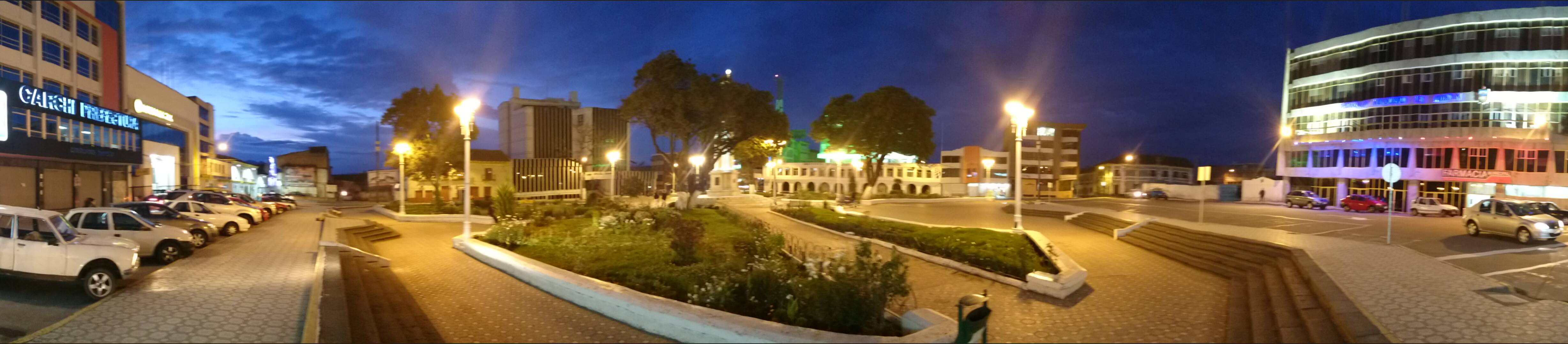 Foto panorámica del parque central de Tulcán - Ecuador.